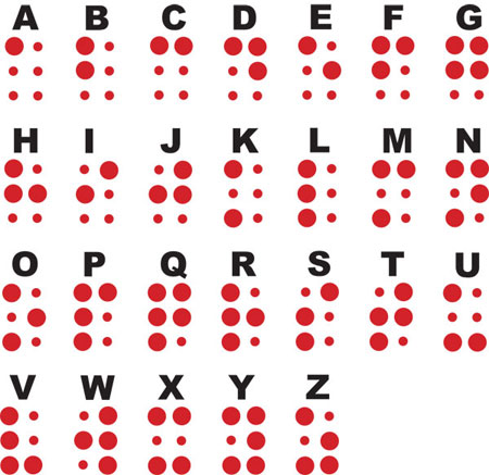 Übersicht der Braille-Schrift